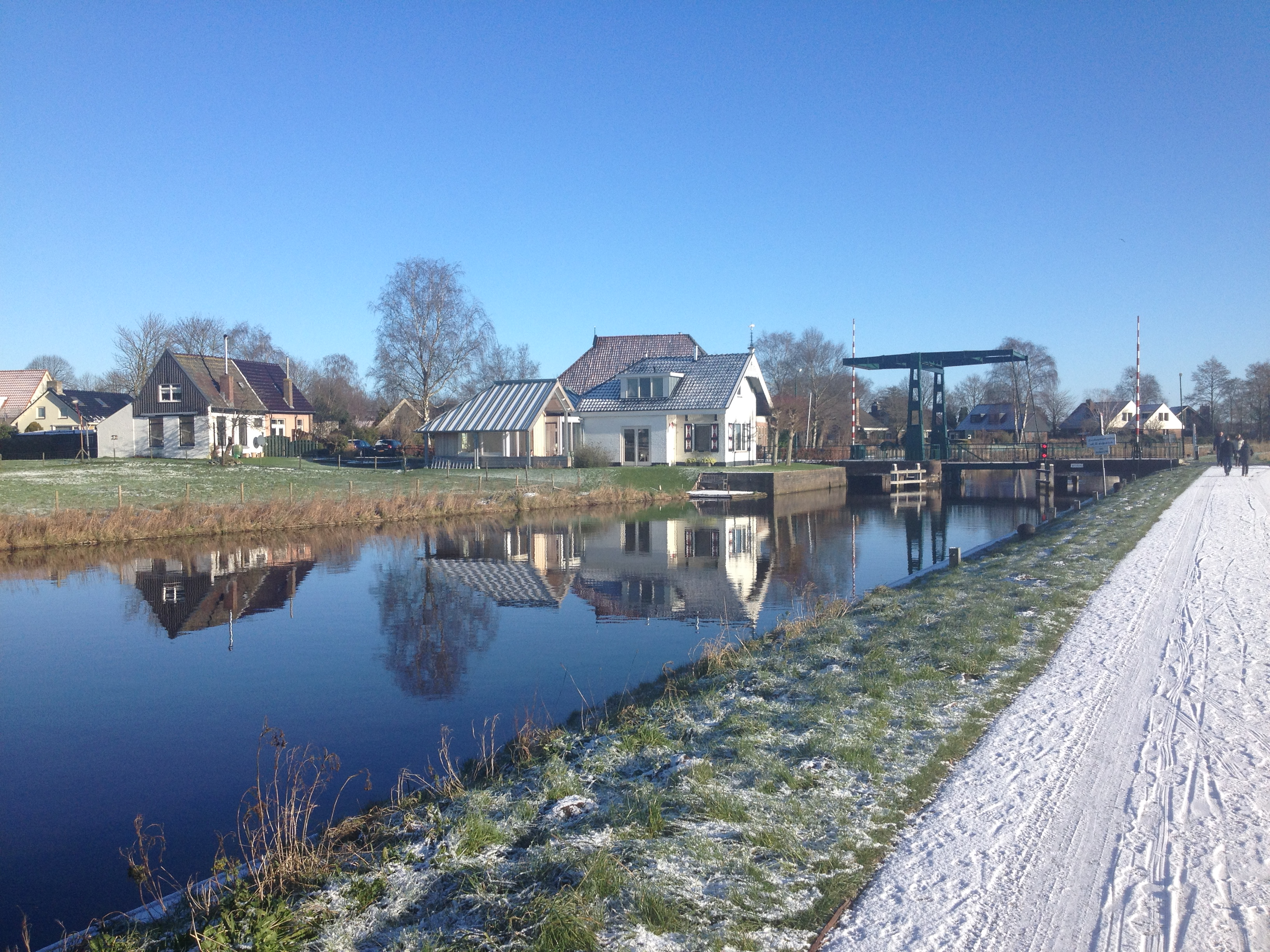 Gezicht vanaf het fietspad langs de Tjonger